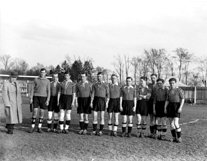 Die Fußballmannschaft des SC Preußen Hindenburg im Jahr 1936. Von links nach rechts: Schneider, Pawlik, Pawelczyk, Eisner, Flanke, Michatsch, Hulla, Dlubatz, Dankert, Buchczyk, Jonek.